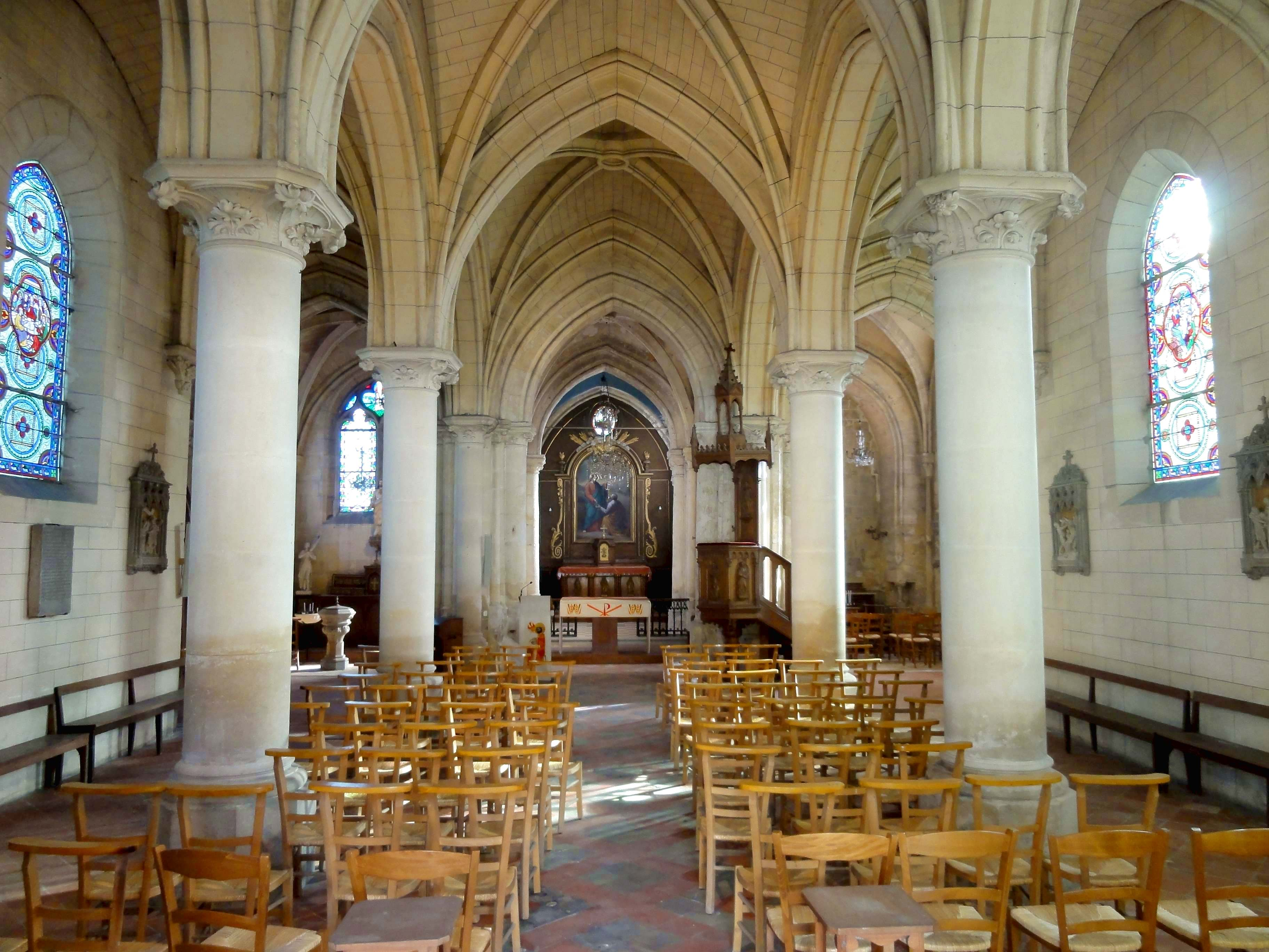 Intérieur de l'église - voir titre.